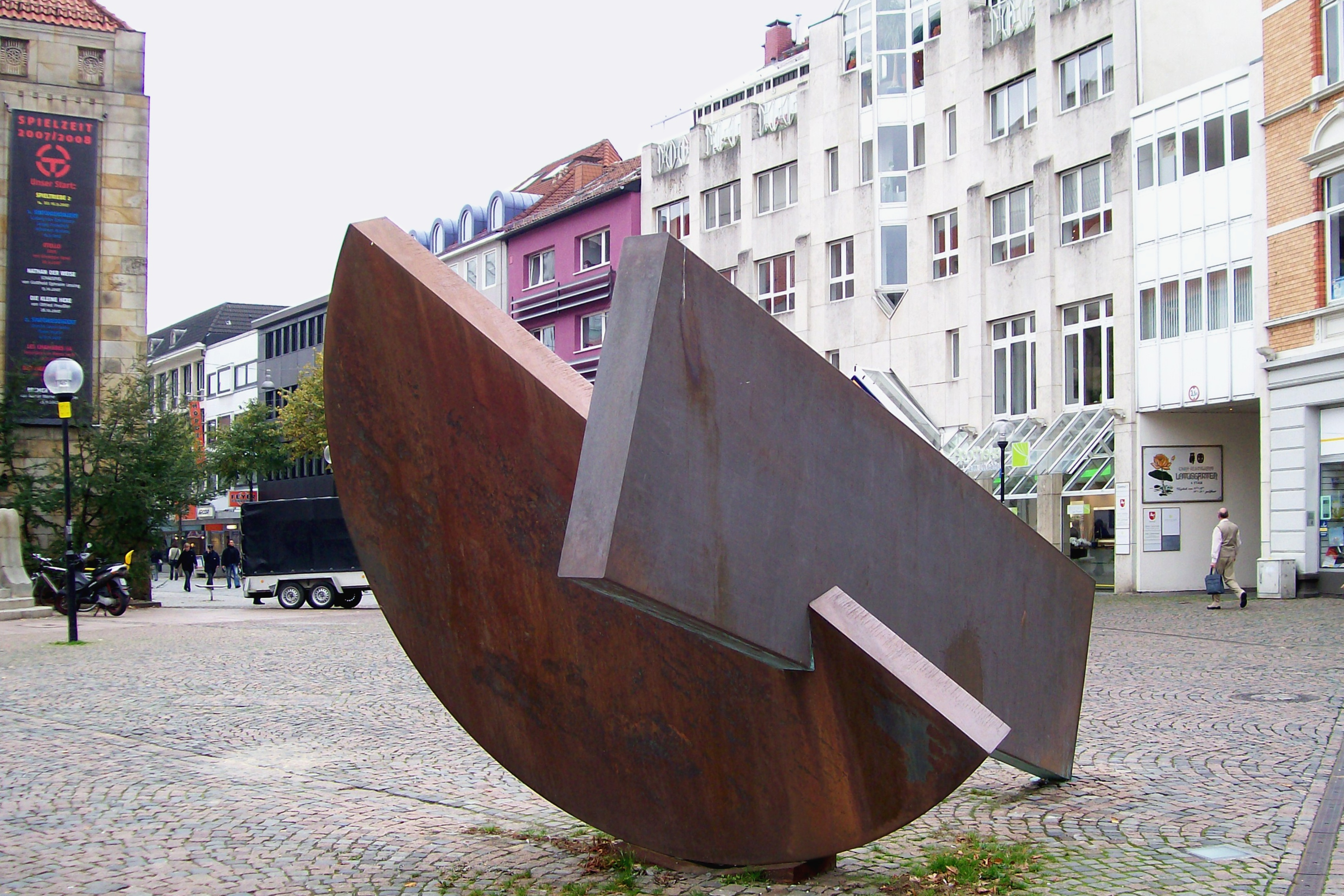 Plastik "Gleiches Gewicht – Gleichgewicht" von Joachim Bandau (*1934 in Köln), vor dem Theater Osnabrück, gestiftet 1998 von der Leischaft#Herrenteichslaischaft aus Anlass der 350. Wiederkehr des Westfälischen Friedens